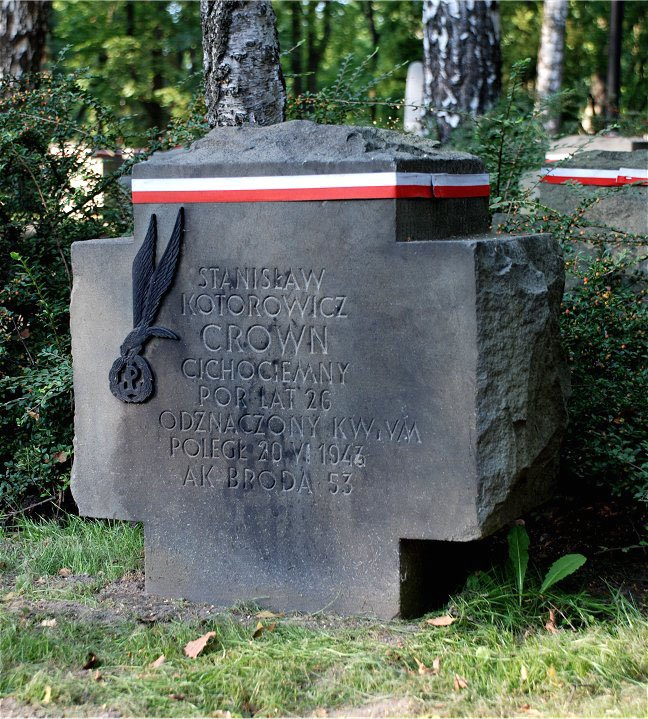 grób Stanisława Kotorowicza na Powązkach wojskowych w Warszawie